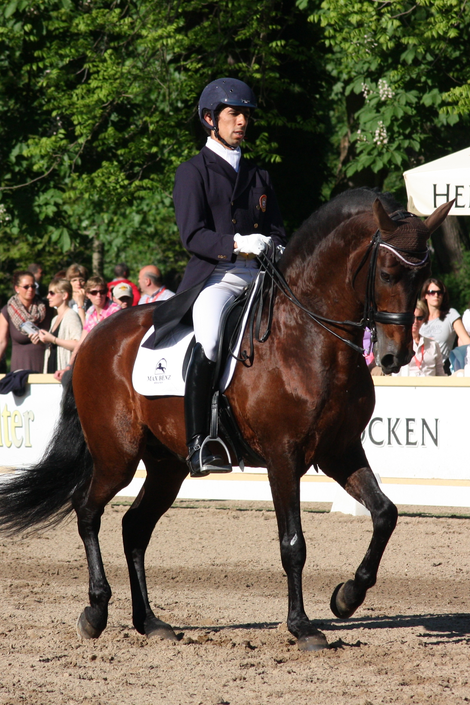 77. Internationales Pfingstturnier Wiesbaden 2013, CDI **** Dressurprüfung Grand Prix de Dressage, Carvalho,Goncalo mit Rubi Personality rights warning Although this work is freely licensed or in the public domain, the person(s) shown may have rights that legally restrict certain re-uses unless those depicted consent to such uses. In these cases, a model release or other evidence of consent could protect you from infringement claims.